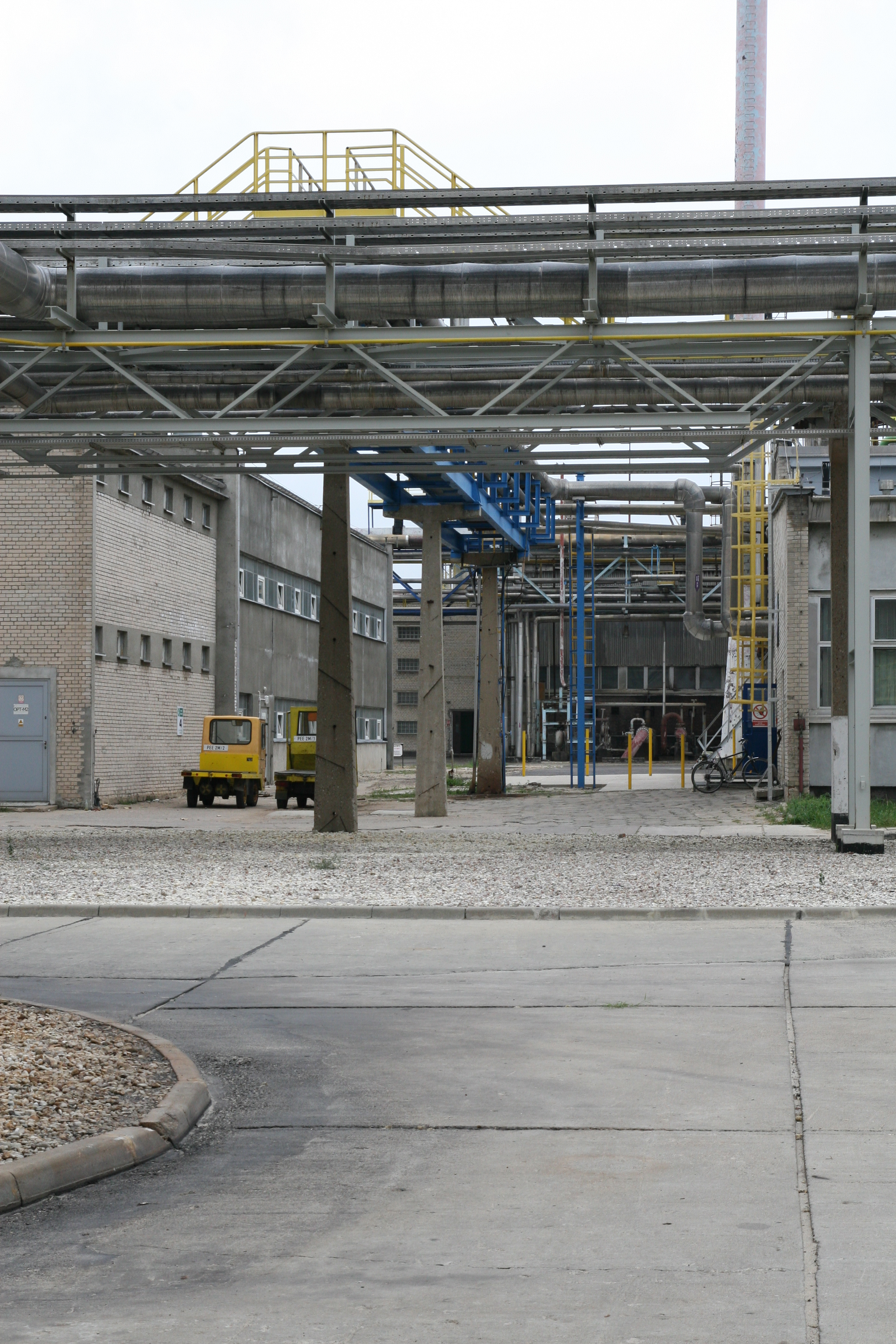 Instalacje produkcyjne w Grupie Azoty Zakładach Azotowych "Puławy" S.A.